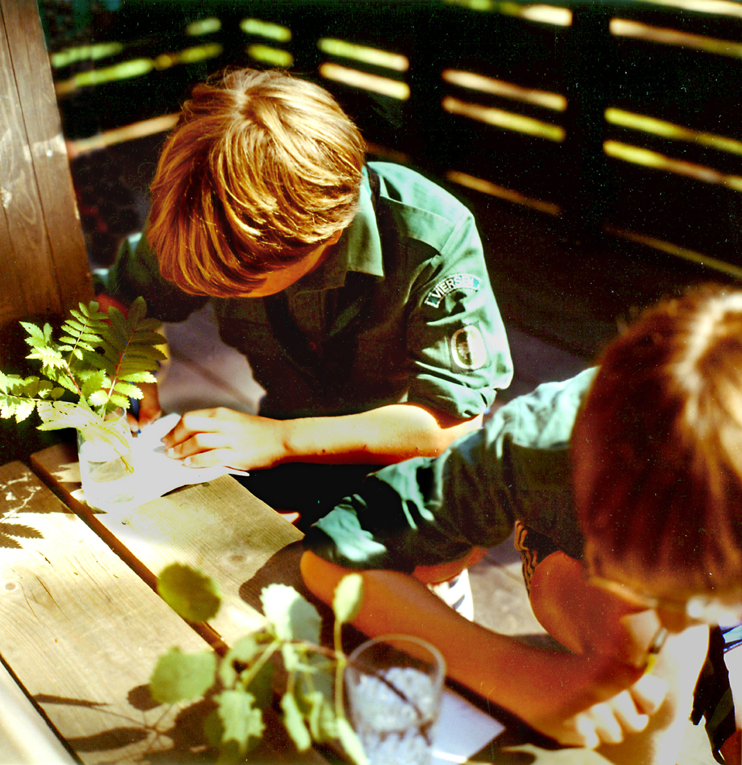 Pfanzenbestimmung beim Hajk. Auf einer Norwegenfahrt der Waldjugend 1984.